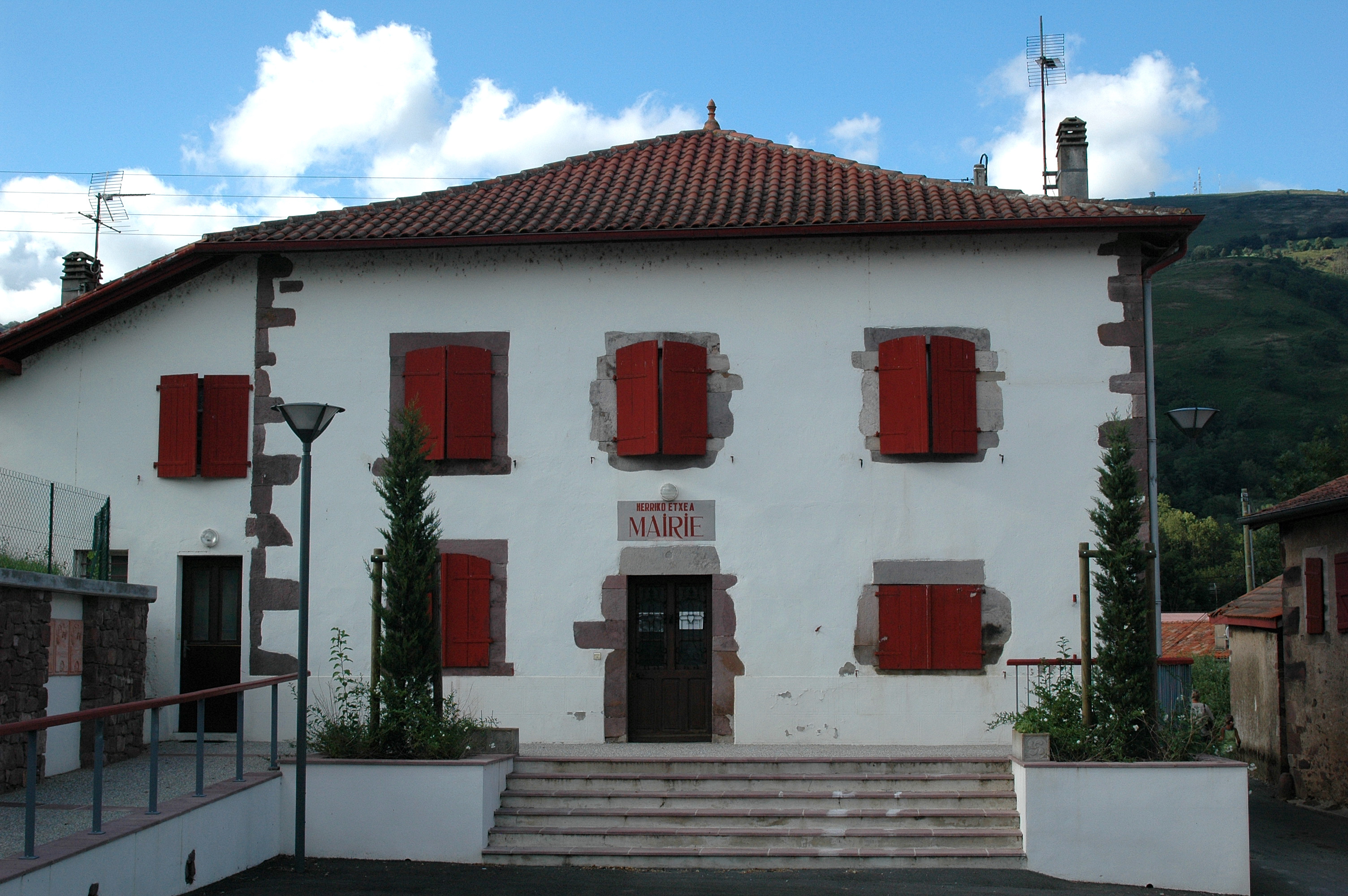 Irouléguy, la mairie. Photo prise le 03/08/06 par Harrieta171